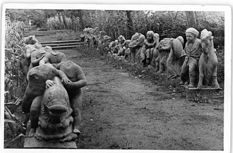 Berlin, Märchenbrunnen, Skulpturen Skulpturen des Märchenbrunnens gefunden. In der Matthiasstraße im Bezirk Friedrichshain in Berlin wurden jetzt die langgesuchten Skulpturen des Märchenbrunnens gefunden. Sie stehen hinter einer vier Meter hohen Mauer in einem Gemüsegarten. UBz: Ein Teil der Skulpturen ist durch Kriegseinwirkungen zerstört. Einige jedoch sind noch vollkommen erhalten. Aufn.: Illus Funck 7607-50 4 18.8.50